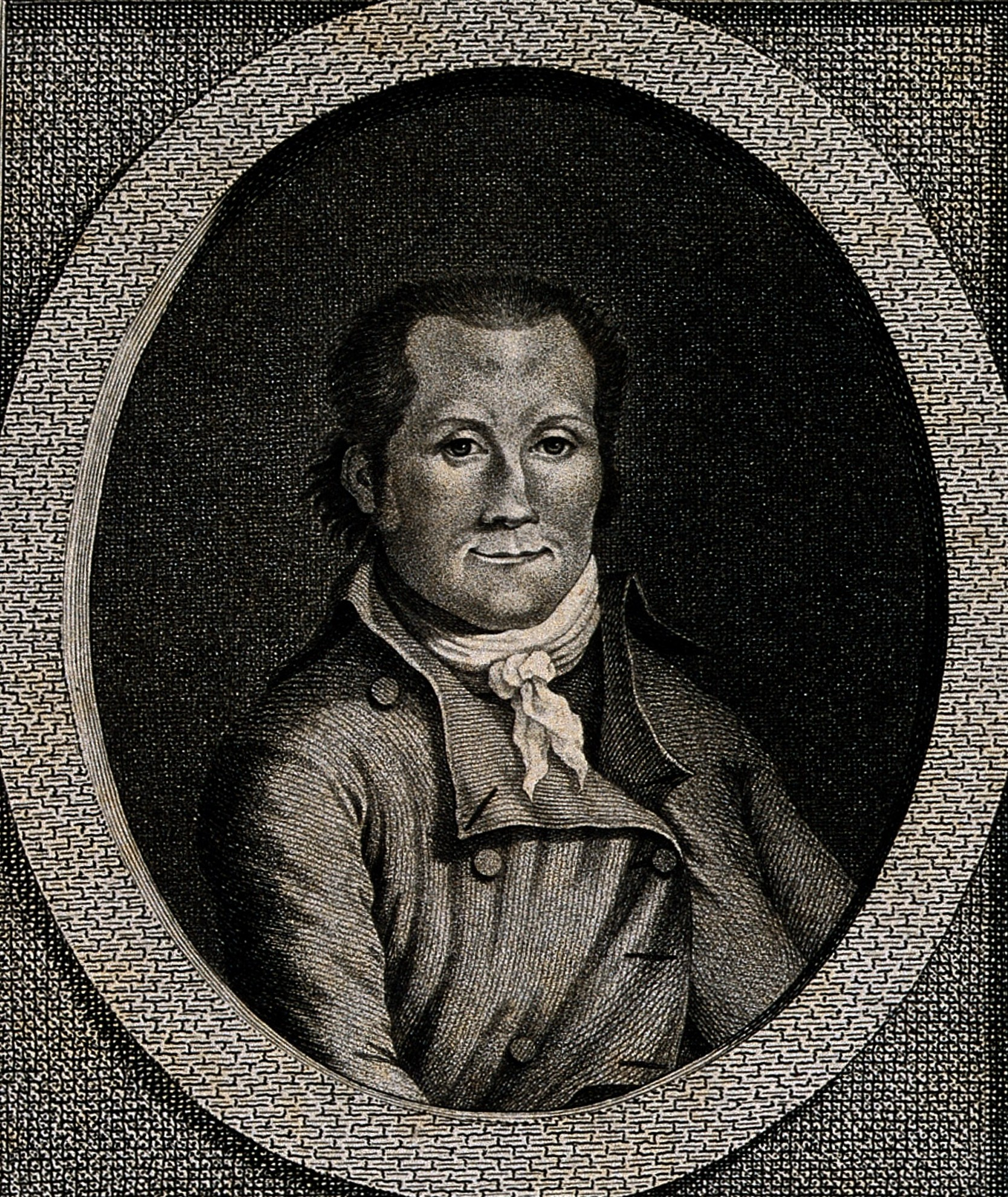 Jean Massieu, a deaf mute. Engraving by L.A. Bouteloup. Iconographic Collections Keywords: intaglio prints; portrait prints; DEAF; Jean. Massieu; Louis-Alexandre Bouteloup; massieu, jean